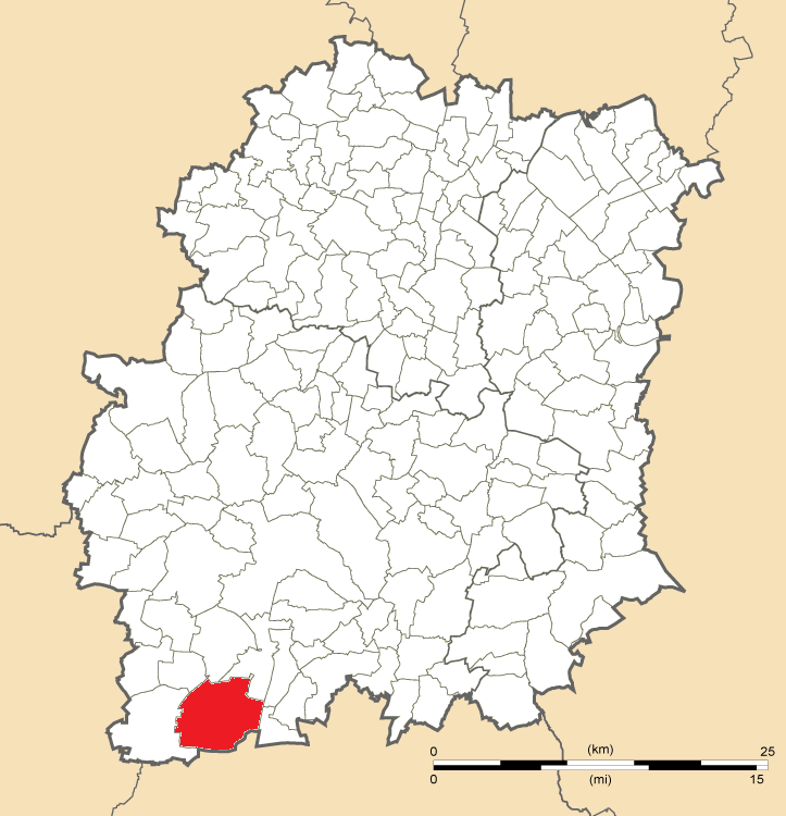 Carte de position de Méréville en Essonne (91)